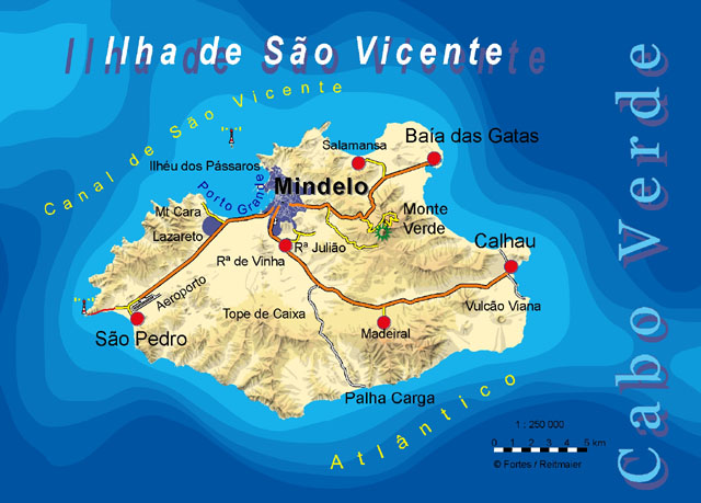 Map of São Vicente Island - Cape Verde